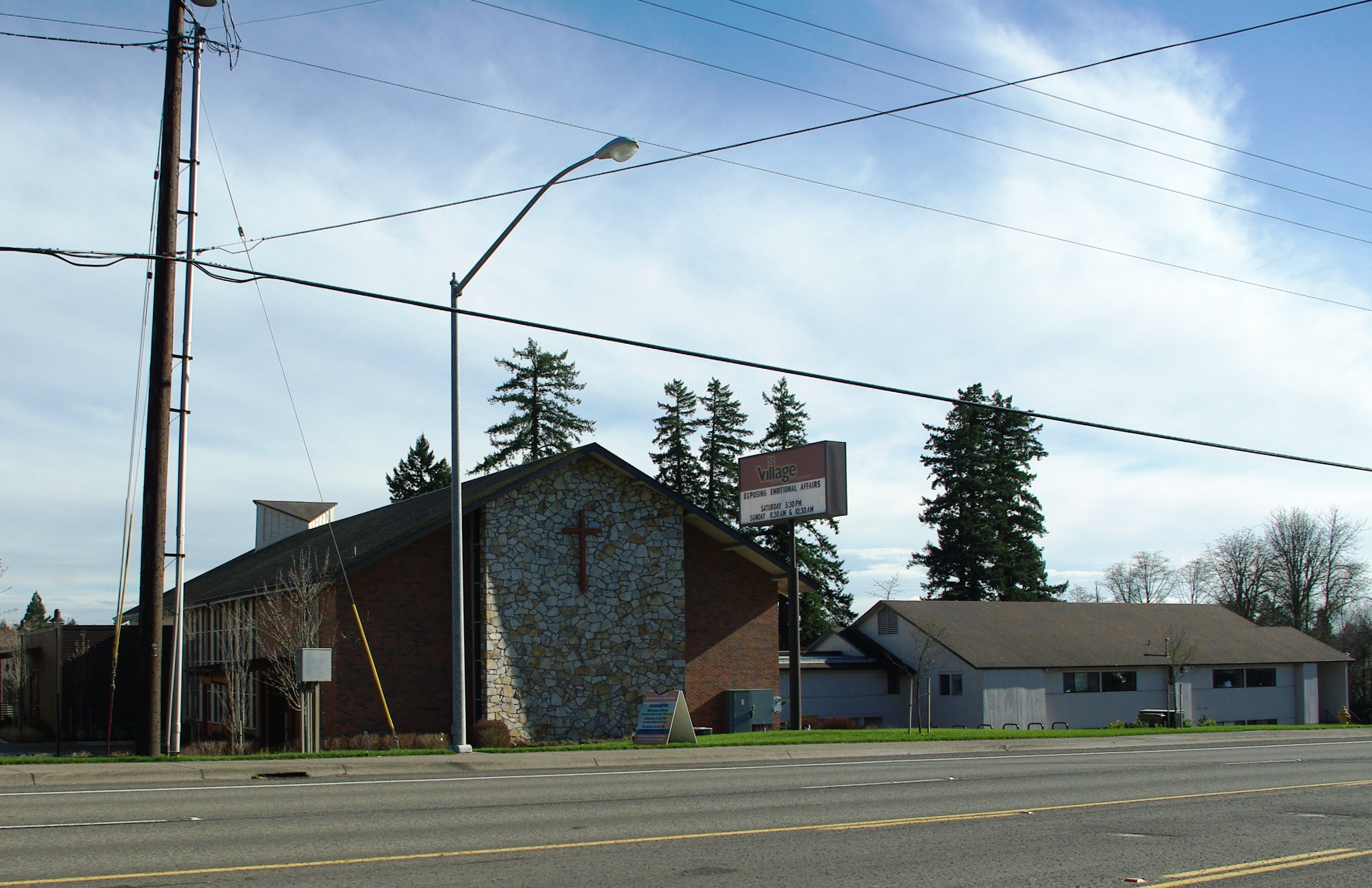 Village church in Marlene Village, Oregon.